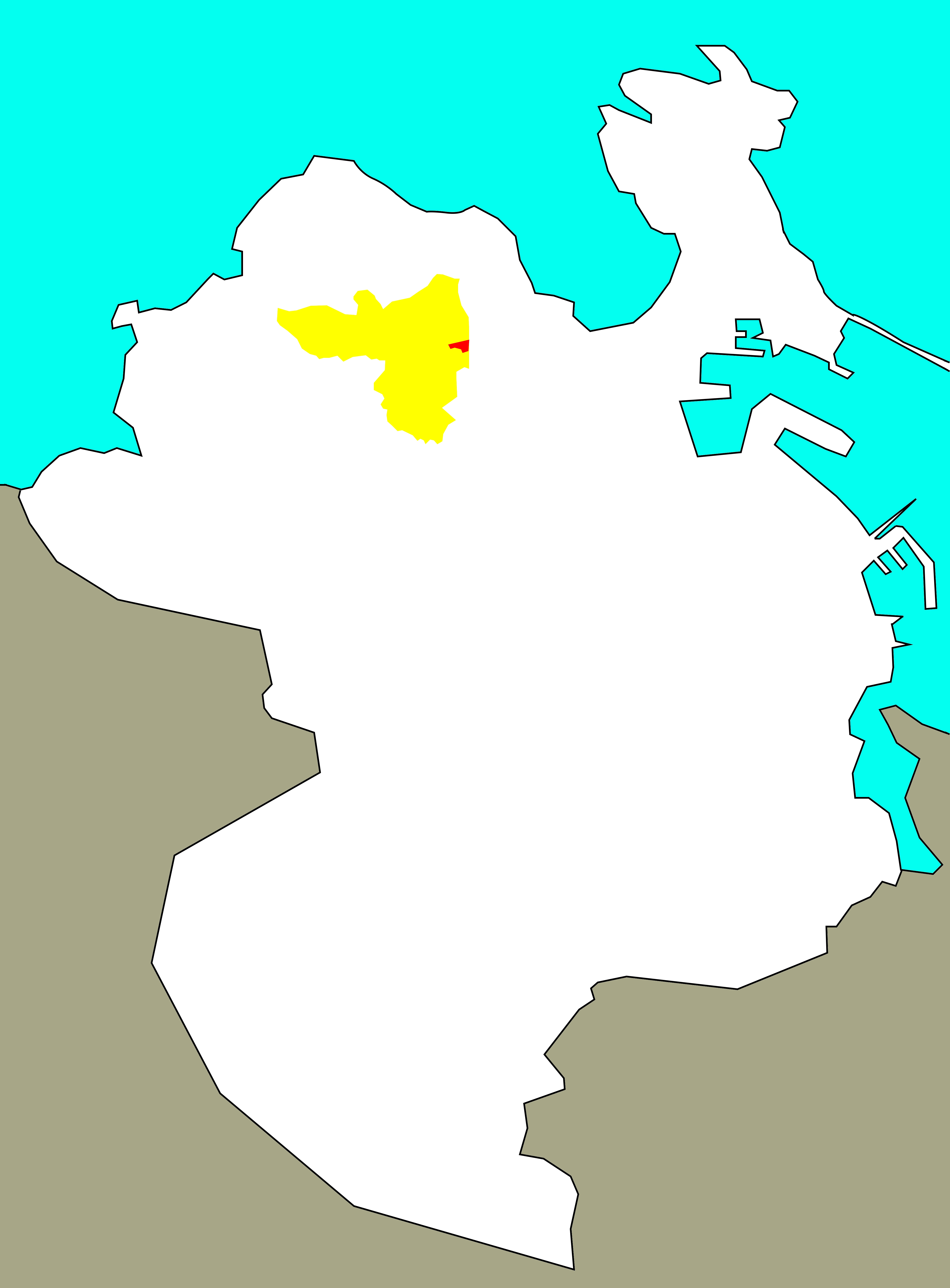 Situación da Costa no "barrio-territorio" de San Pedro de Visma.[1]